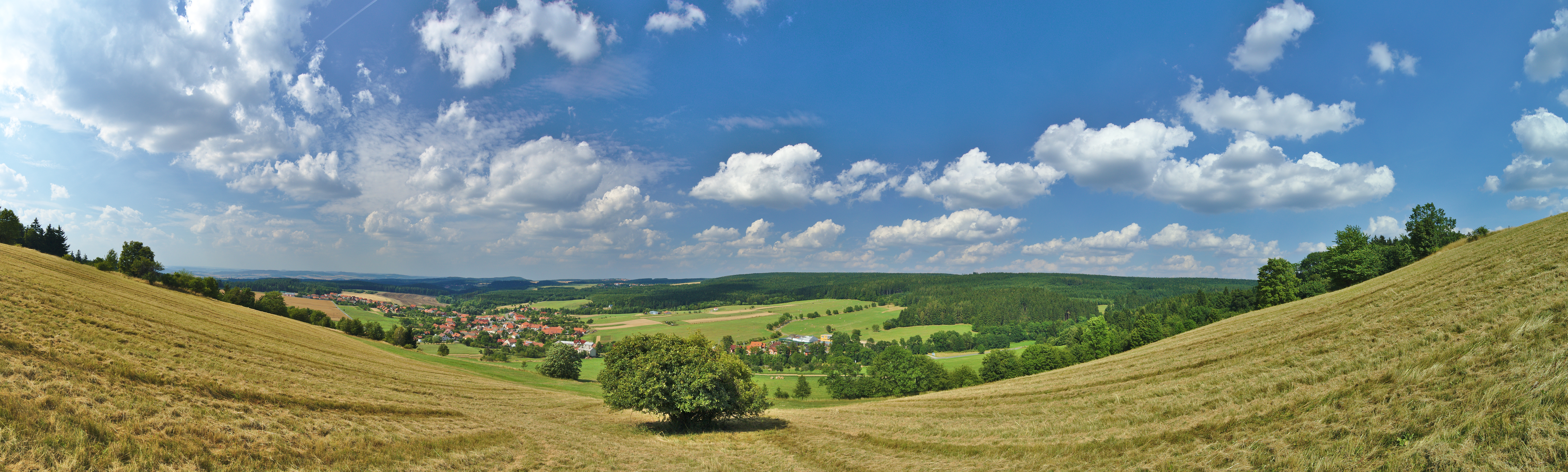 Panoramatický pohled na Valchov od jihu, okres Blansko